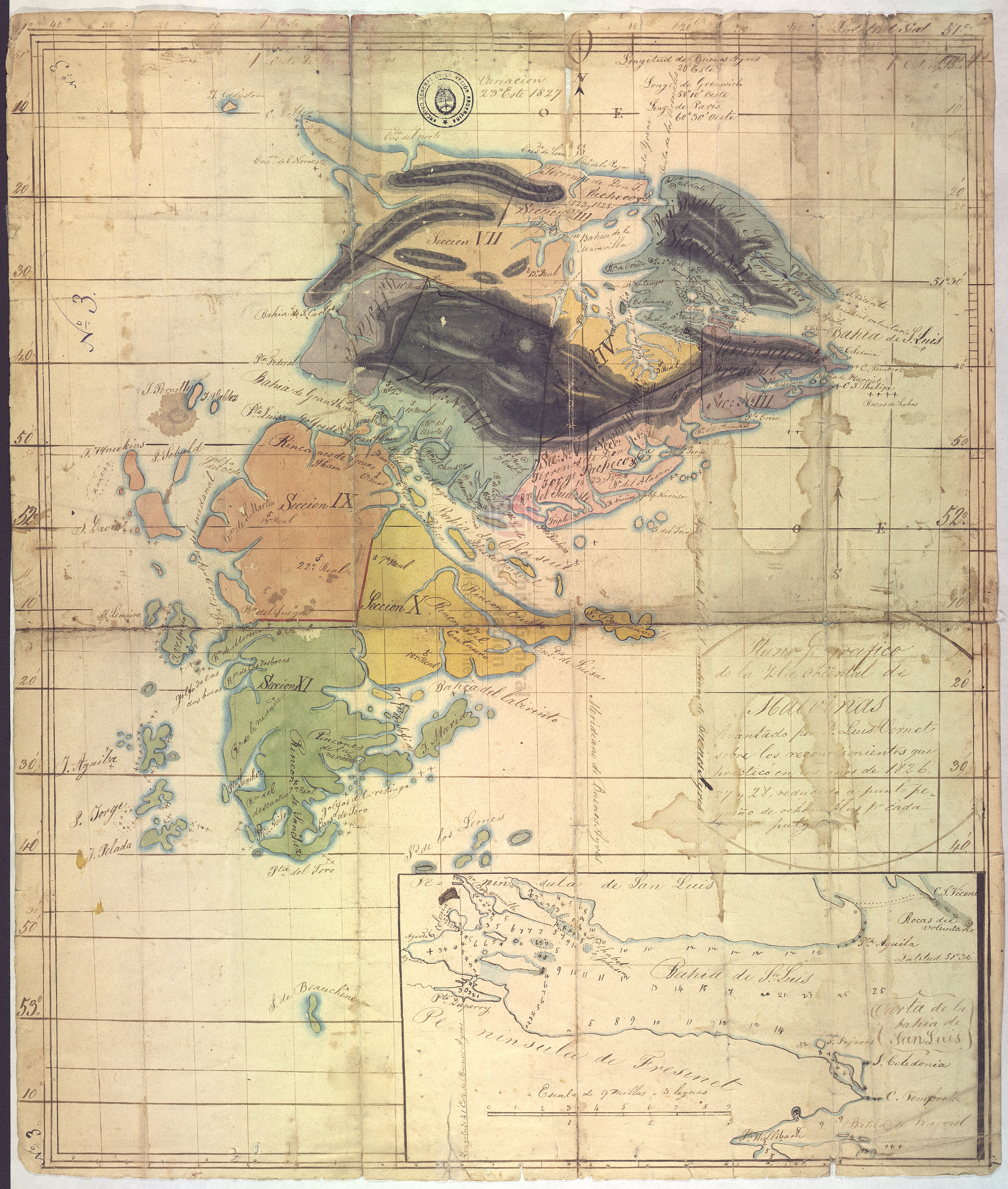 Plano de la isla Oriental de Malvinas, levantado por Dn. Luis Vernet sobre los reconocimientos que practicó entre los años de 1826, 27 y 28, reducido a punto pequeño de ocho millas por cada pulgada.